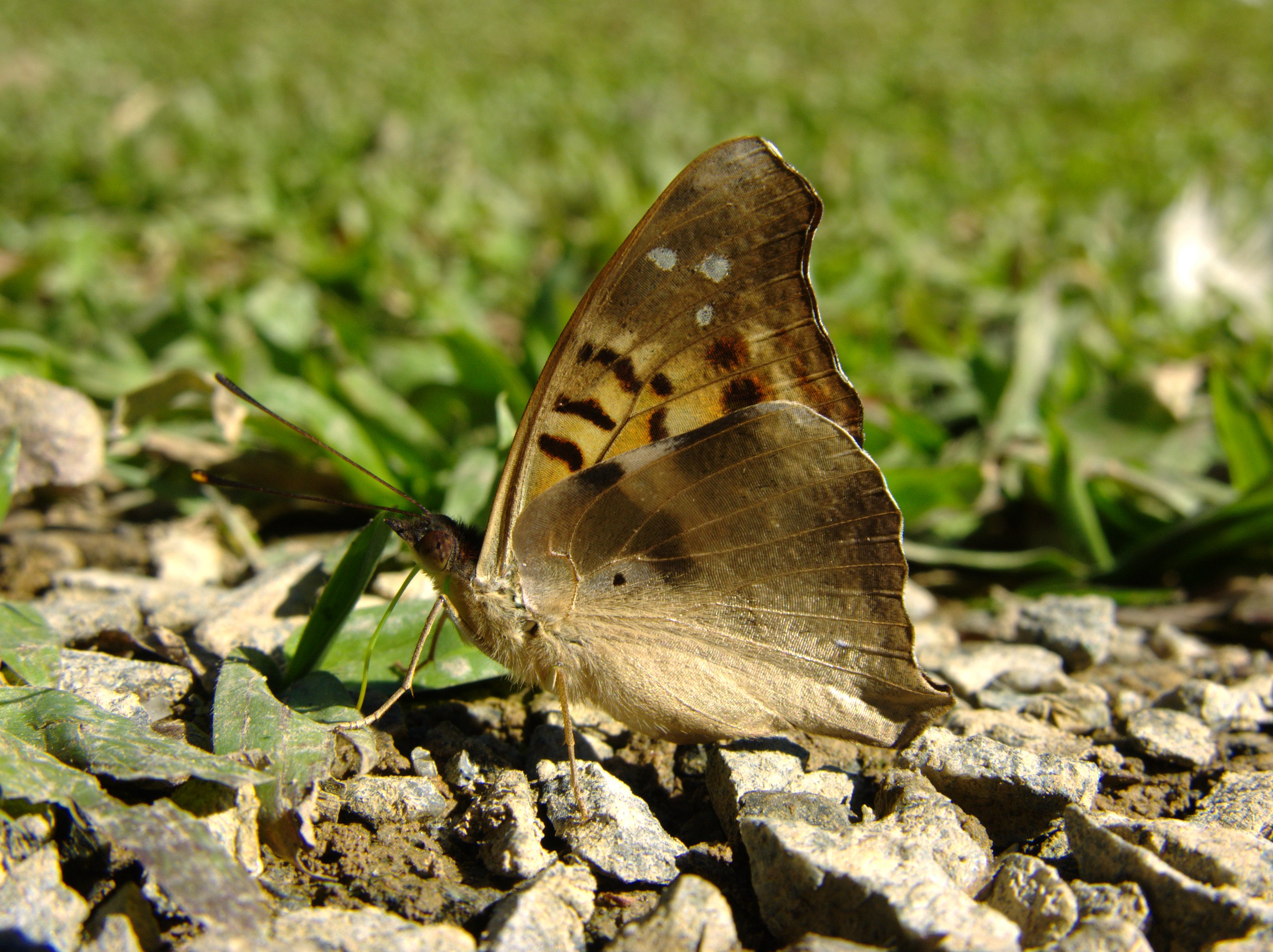 Doxocopa laurentia (Nymphalidae, Apaturinae), Curitiba, Brasil. Male.